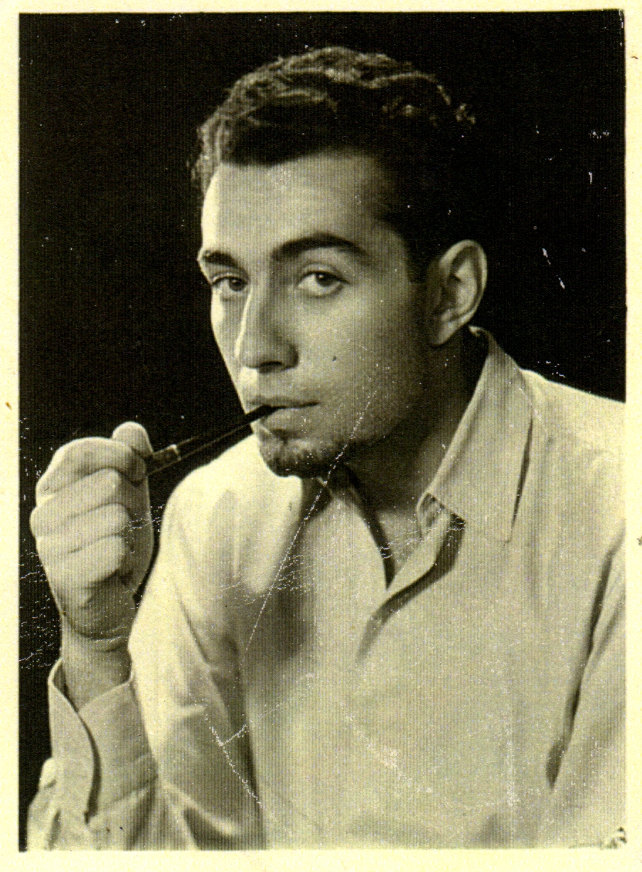 Dr. George Teodoru in 1951 als er den 1.Preis in Suomen Shakki errungen hatte.